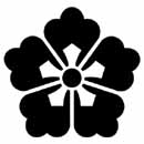 梅ヶ唐花